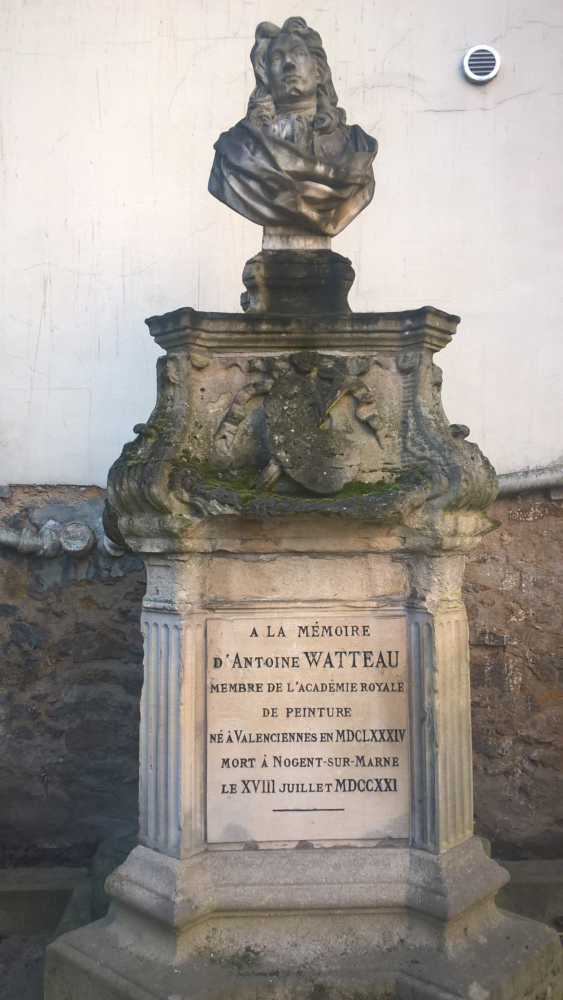 Stèle commémorative élevée à Antoine Watteau à Nogent-sur-Marne